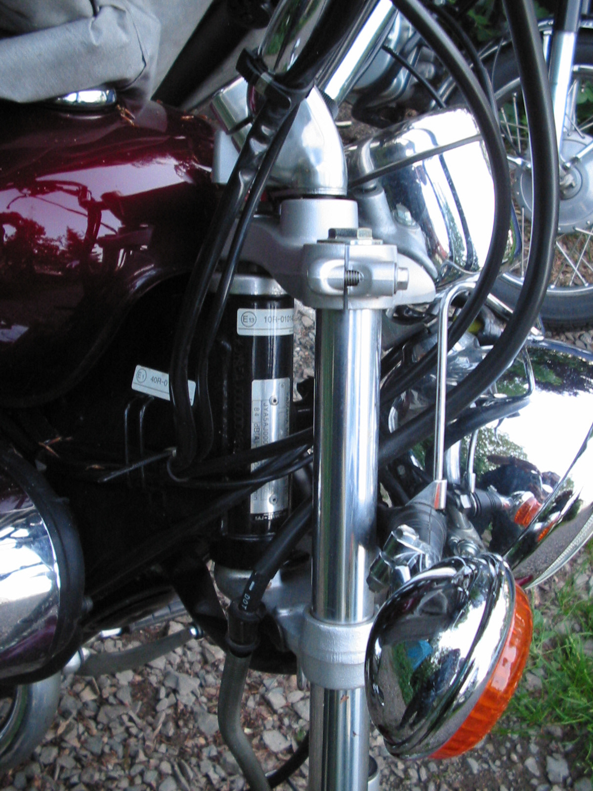 Obere und untere Gabelbrücke bei einer Yamaha Virago.